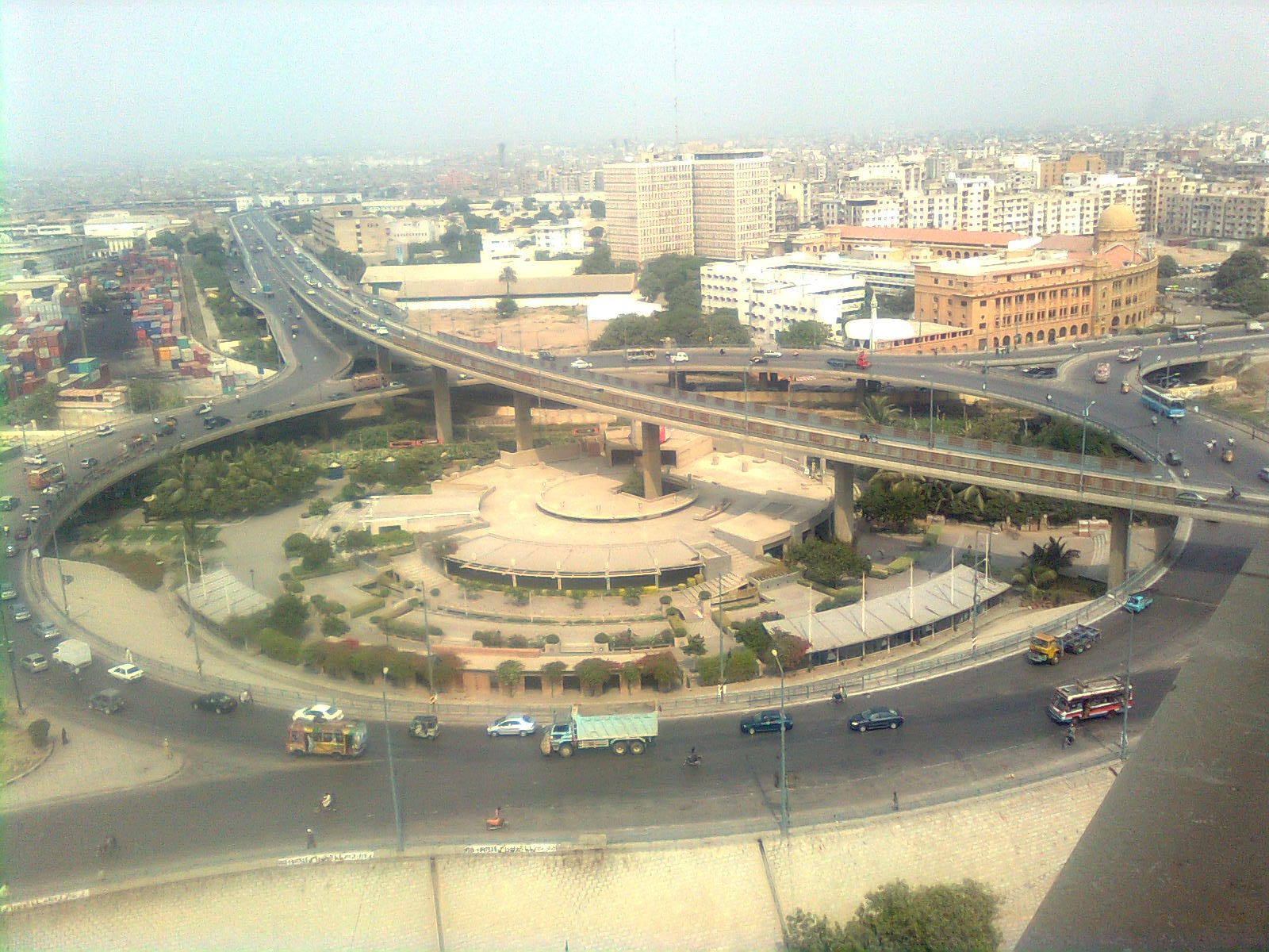 Neti jeti Bridge